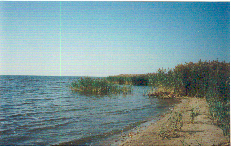 Peipussjøen har flere strender langs breddene. Her fra estisk side av innsjøen. Foto: Jan-Erik Løken.